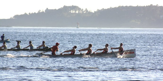 regata